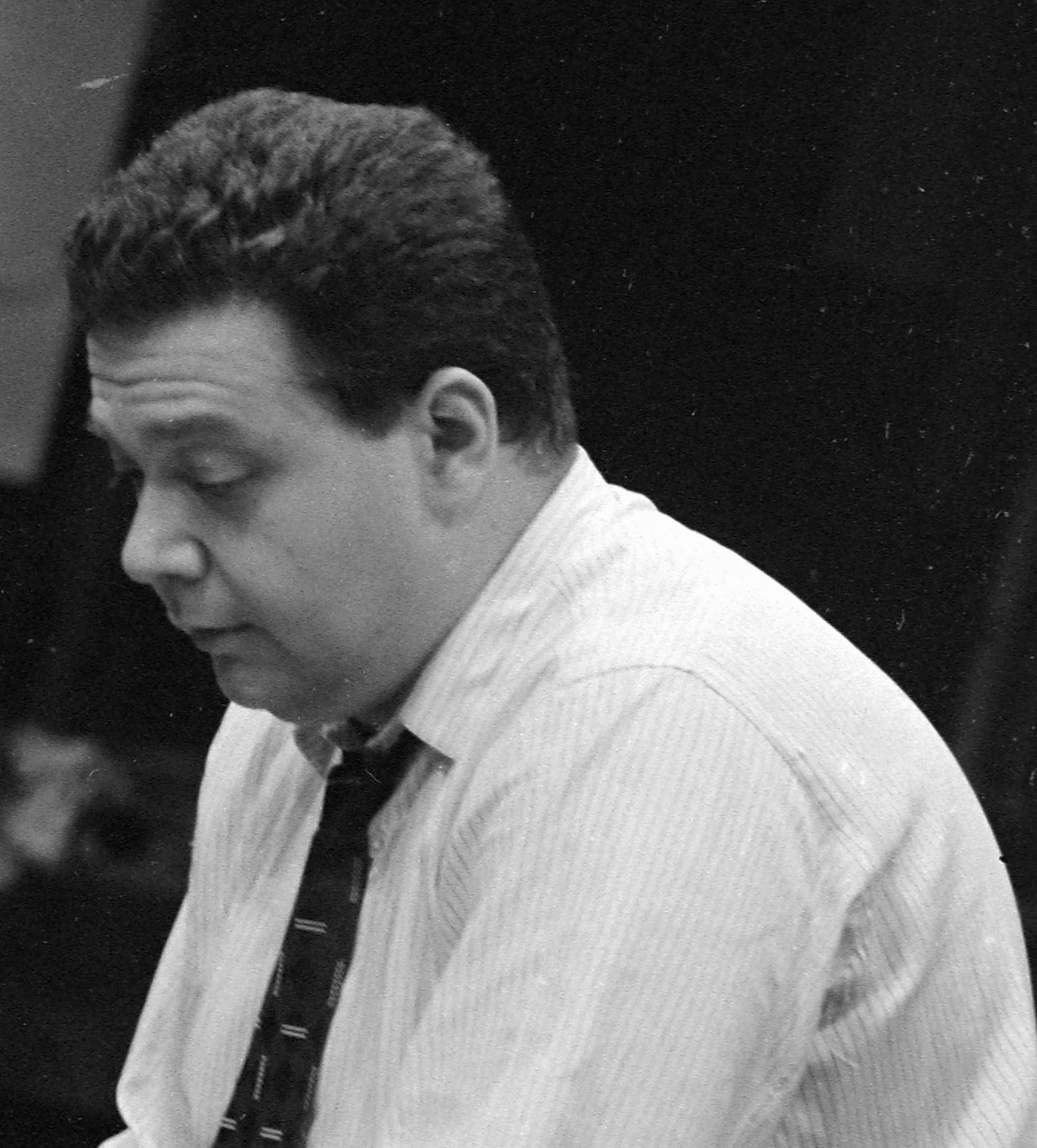 Lehel György magyar karmester.